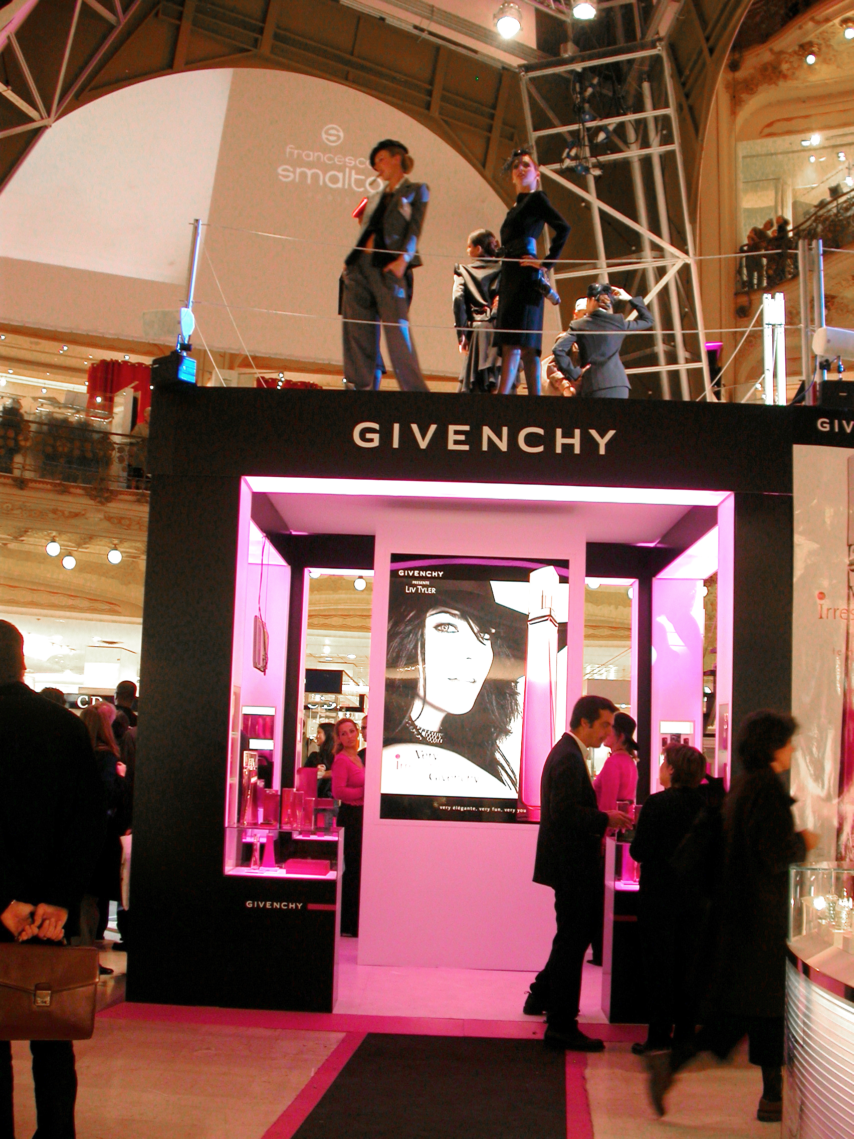 Podium événementiel : lancement de parfum + animation défilé (création Christine CLEMENT)